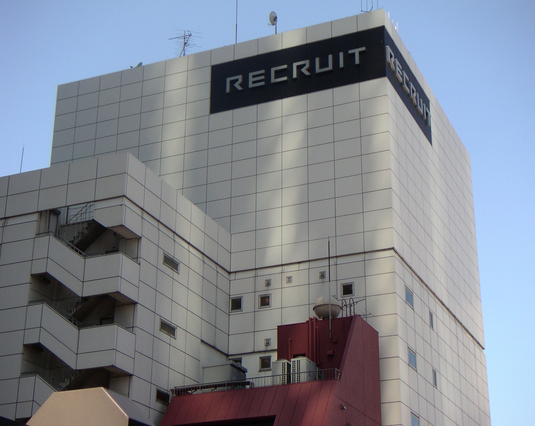 Recruit Higashi Shinbashi bdg. ja: リクルート東新橋ビル